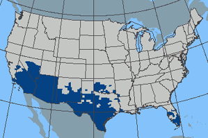 The distribution of Africanized honey bees, in the US, as of 2005 Ausbreitung der Afrikanisierten Honigbiene in den Vereinigten Staaten, Stand 2005 Propagation de l'abeille tueuse aux Etats Unis, état de l'information de 2005